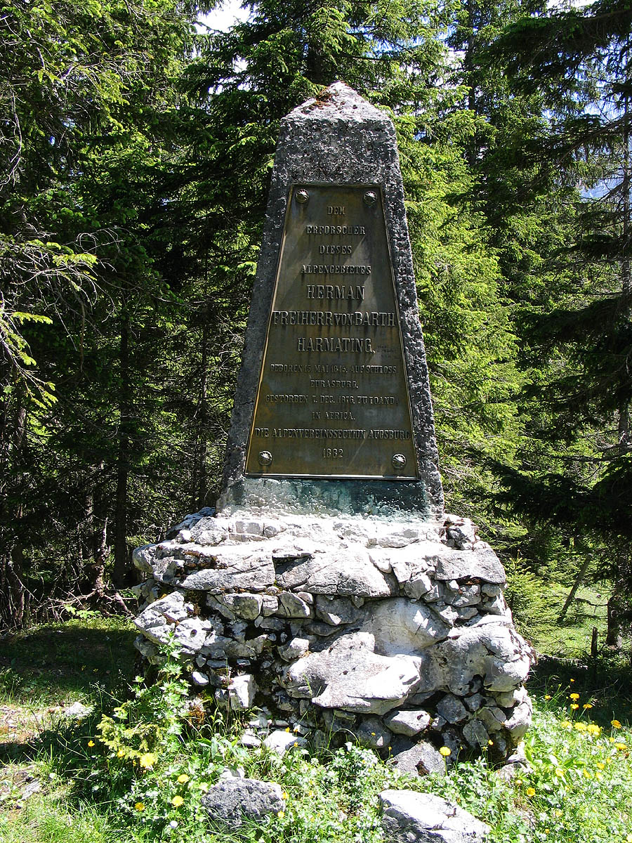 Das Hermann von Barth-Denkmal am Kleinen Ahornboden, Karwendel, Tirol, Österreich. Dieser Steinobelisk trägt die Inschrift: "DEM ERFORSCHER DIESES ALPENGEBIETES HERMANN FREIHERR von BARTH HARMATING. GEBOREN 15. MAI 1845 AUF SCHLOß EURASBURG. GESTORBEN 7. Dec 1876 ZU LOANDA IN AFRICA. DIE ALPENVEREINSSECTION AUGSBURG 1882" Hinweis: Der Geburtstag ist auf dem Denkmal falsch wiedergegeben. Richtig ist der 5. Juni 1845.